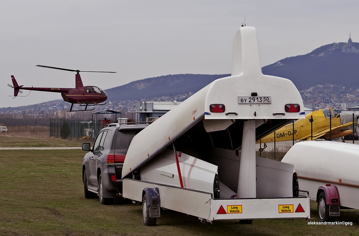 Airfield Nitra.Slovakia.